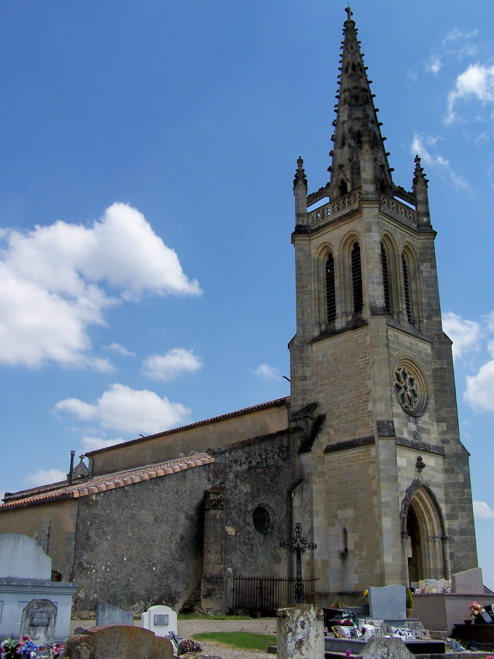 Église de Saint-Pierre-de-Mons, Gironde, France